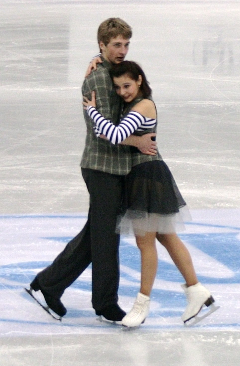 Барбара Сильна и Юрий Куракин (Австрия) на чемпионате мира по фигурному катанию 2012, предварительный раунд.